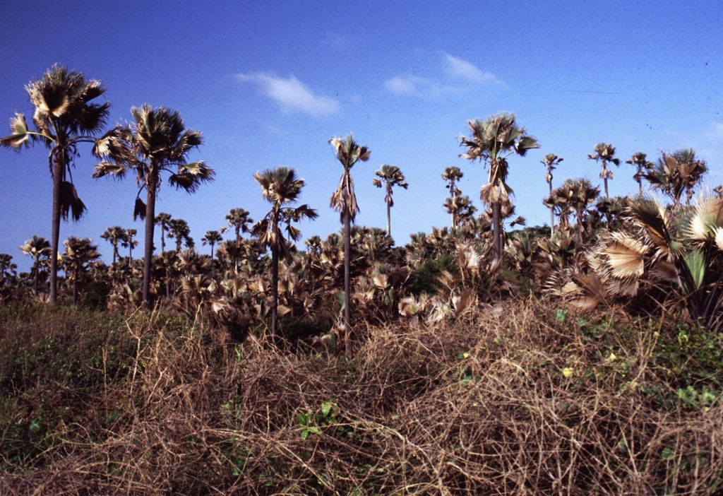 Borassuspalmen im Bijilo Park vom Strand aus gesehen